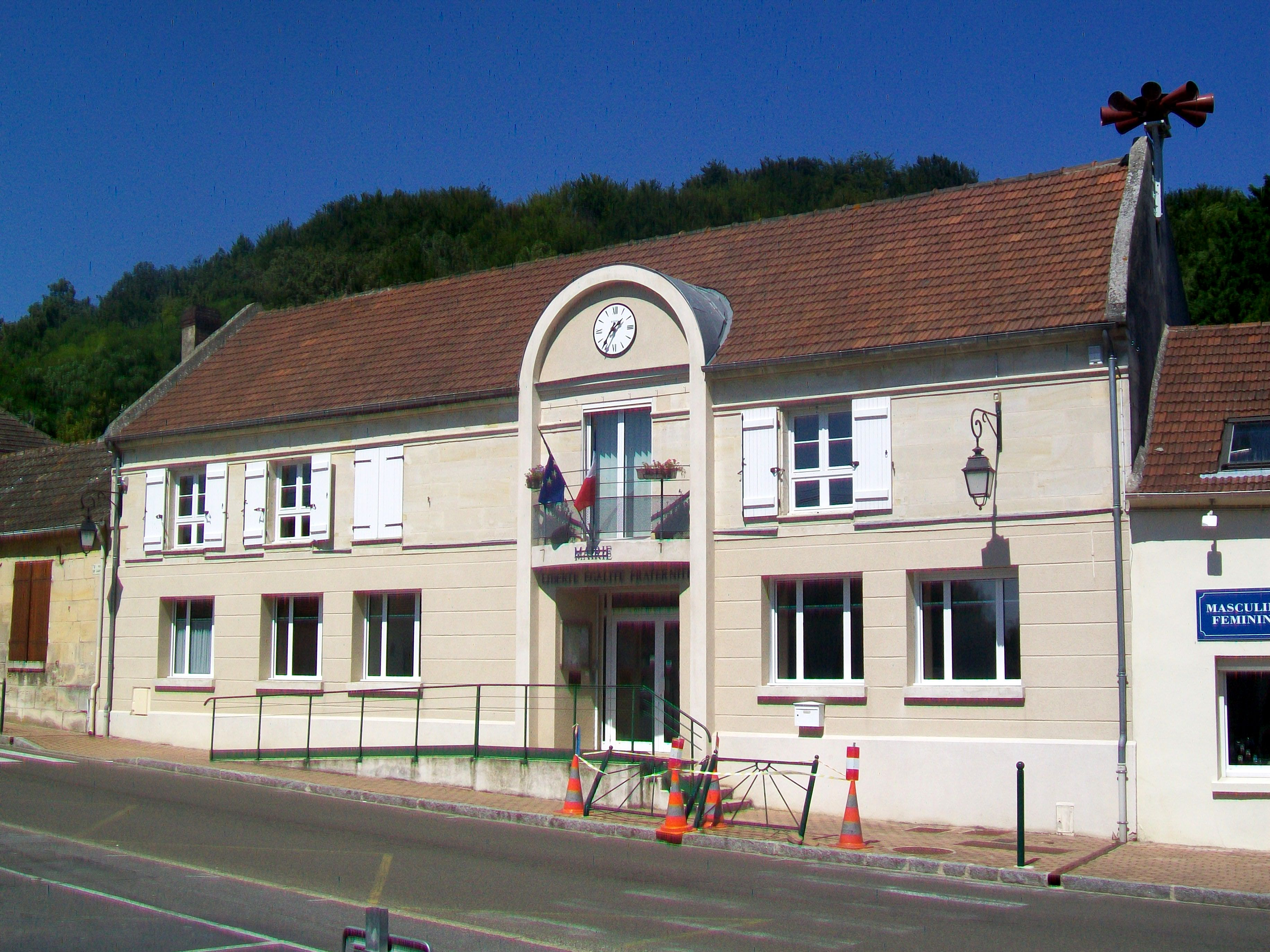 La nouvelle mairie, rue de Liancourt.